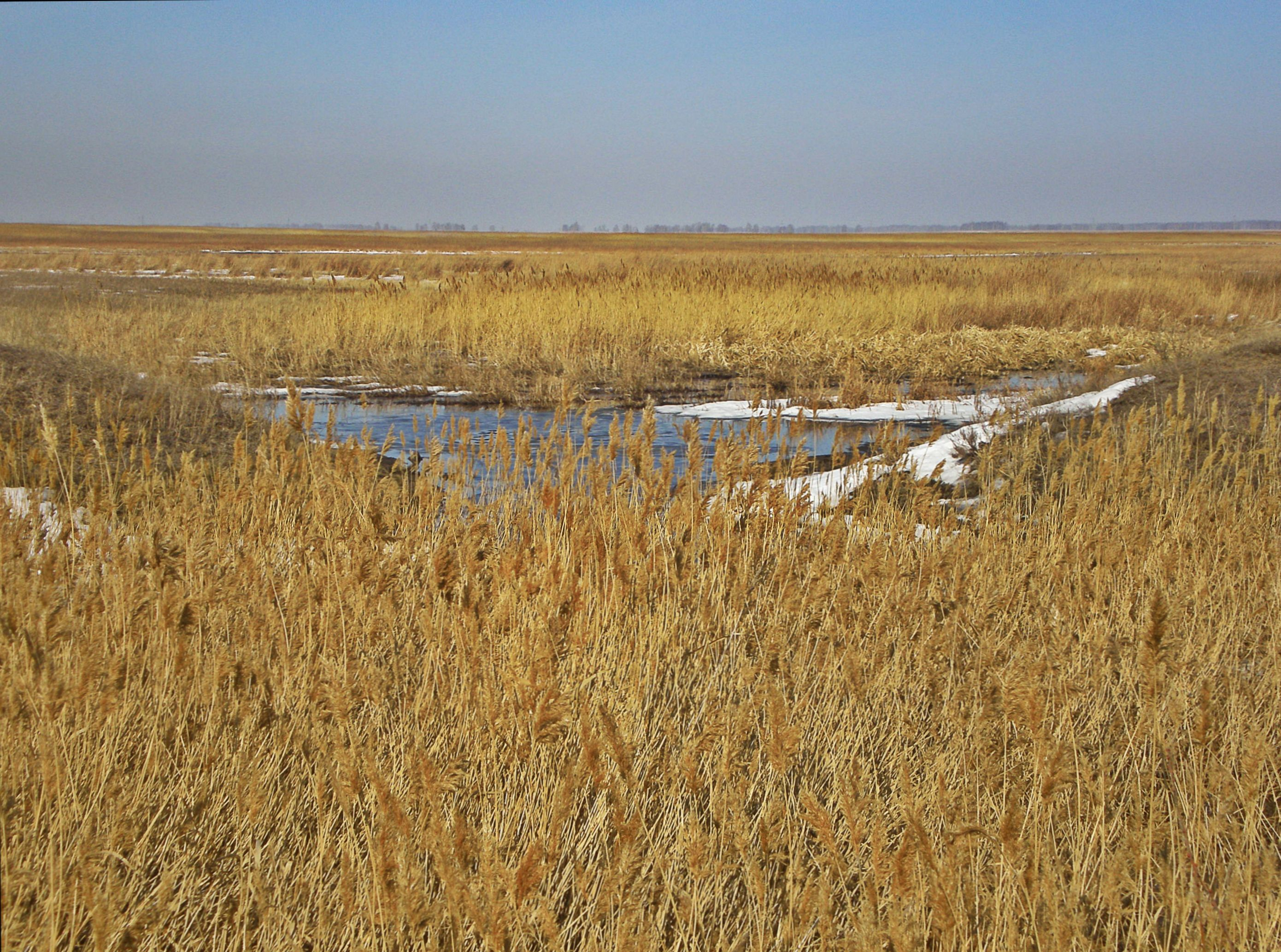 Урочище Кесене, Варненский район This image is related to the protected area of Russia number 7410060